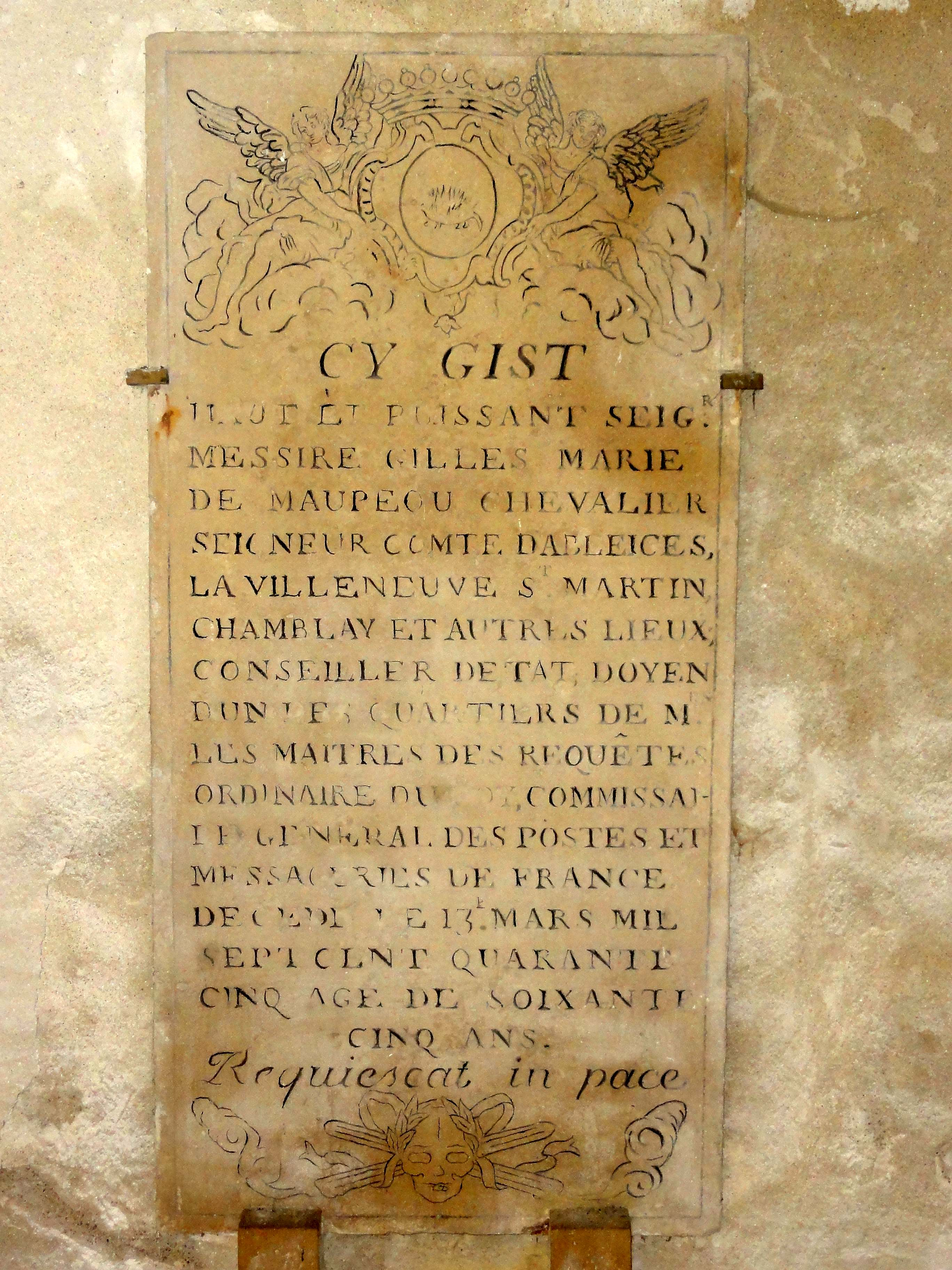 Pierre tombale de Gilles Marie de Maupéou, mort en 1745.